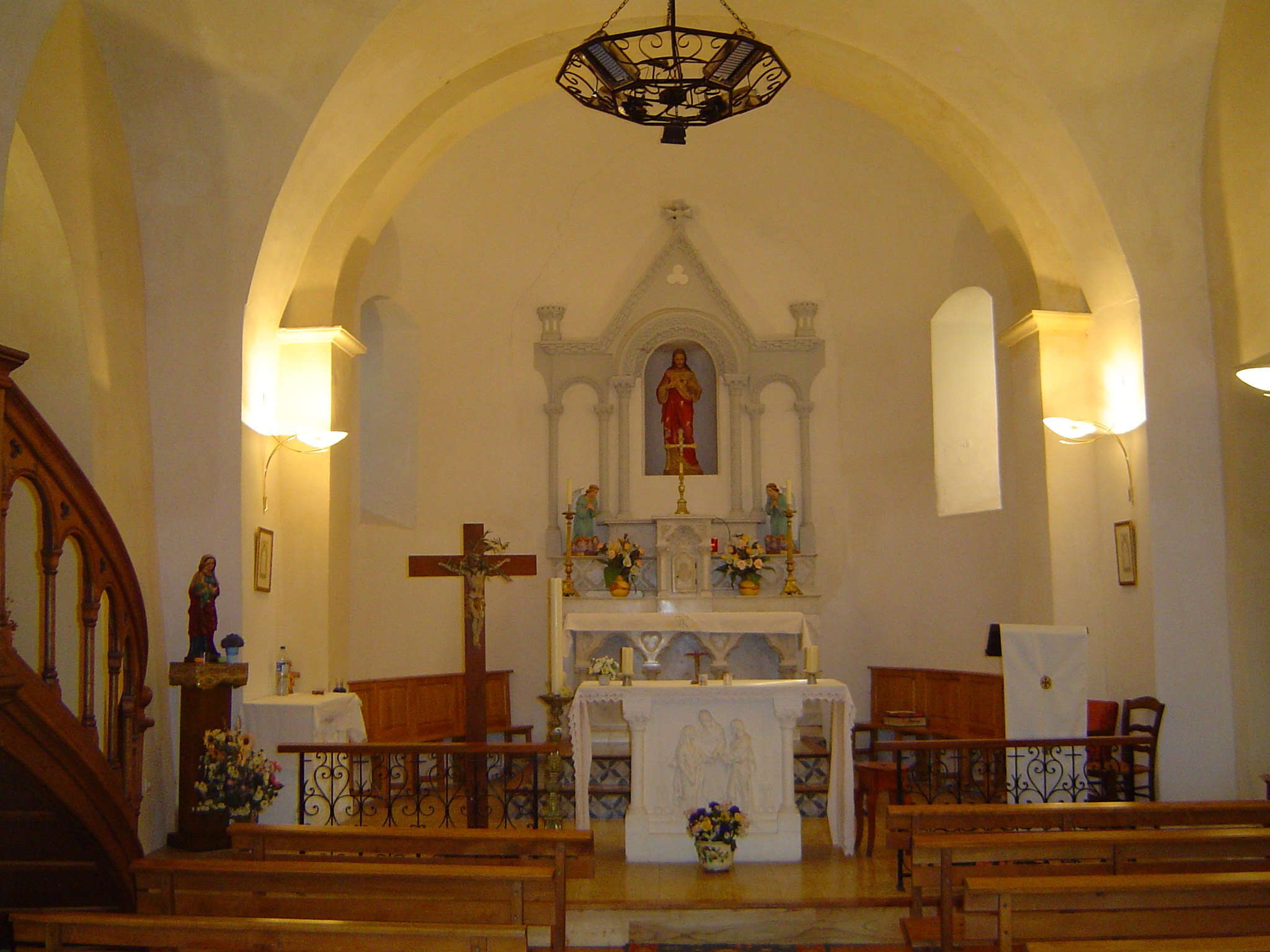 Photo prise à Saint-Étienne-le-Laus